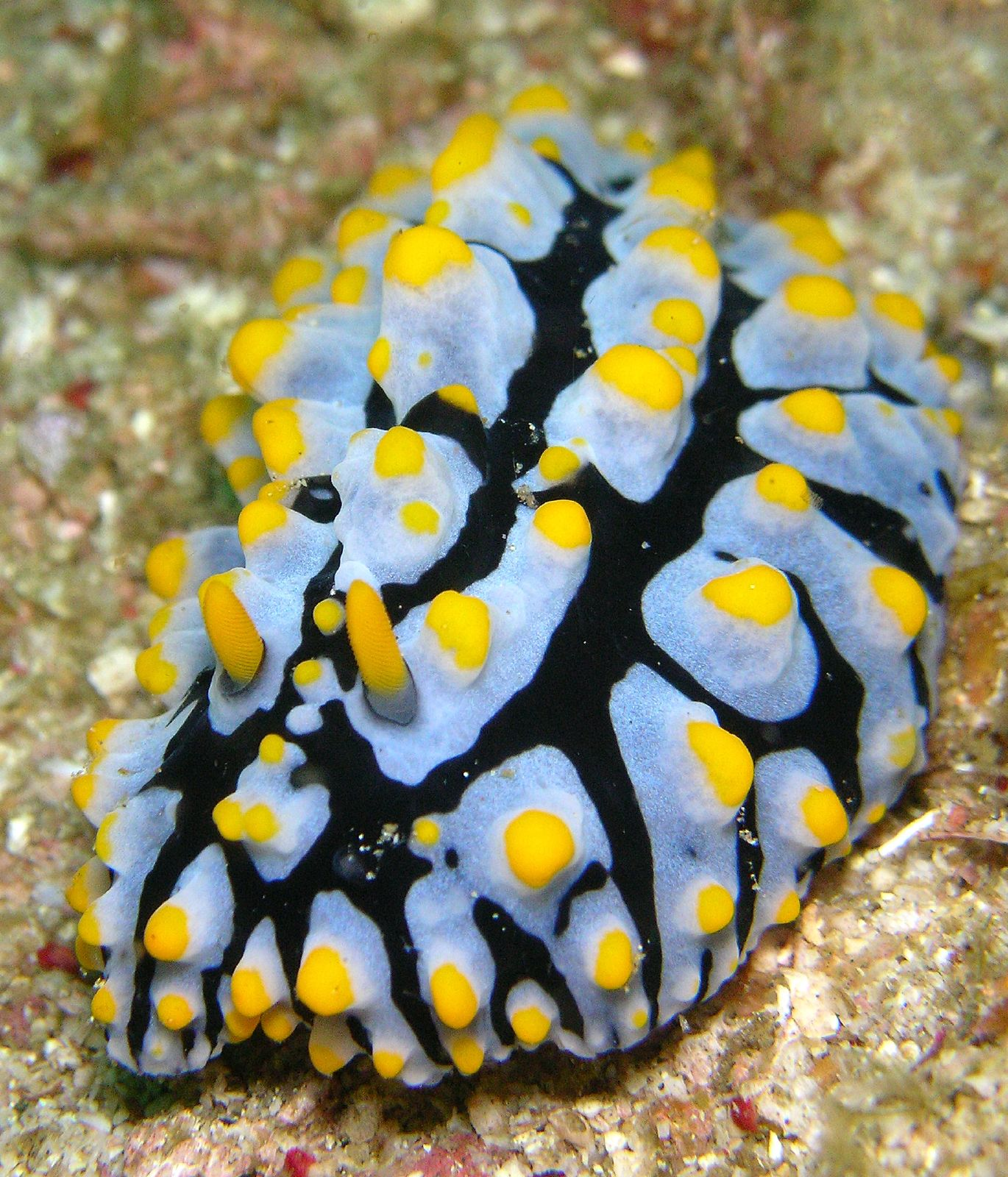 Phyllidia varicosa